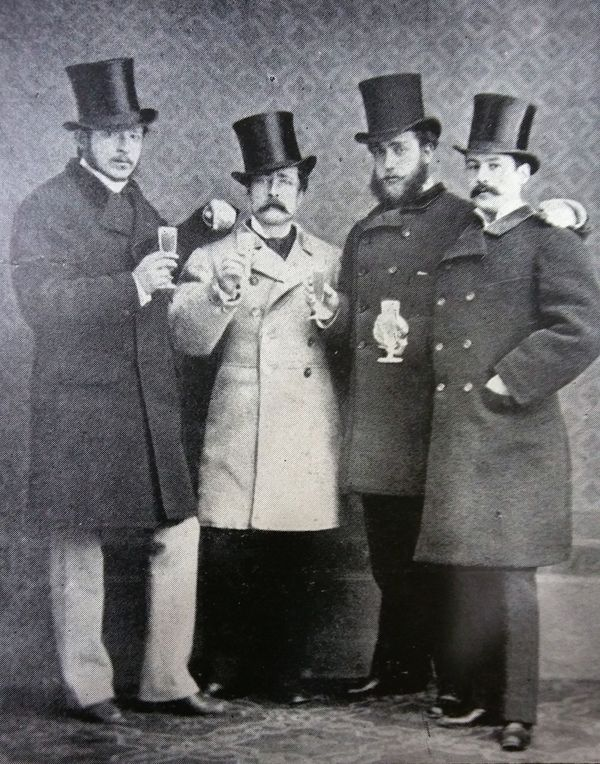 Szapáry Imre, Blaskovich Ernő, Uchtritz Zsigmond és Pázmándy Béla 1865-ben